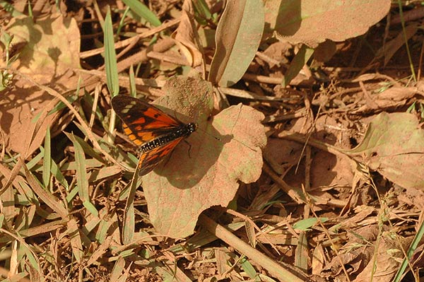 Uganda Echuya Forest, SW Uganda